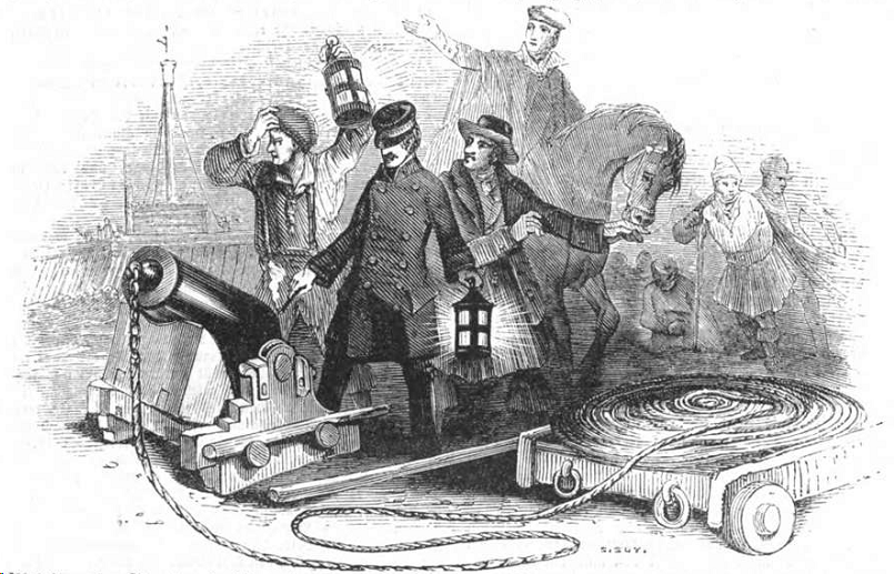 Capitain Manby’s Mörser-Rettungstau.